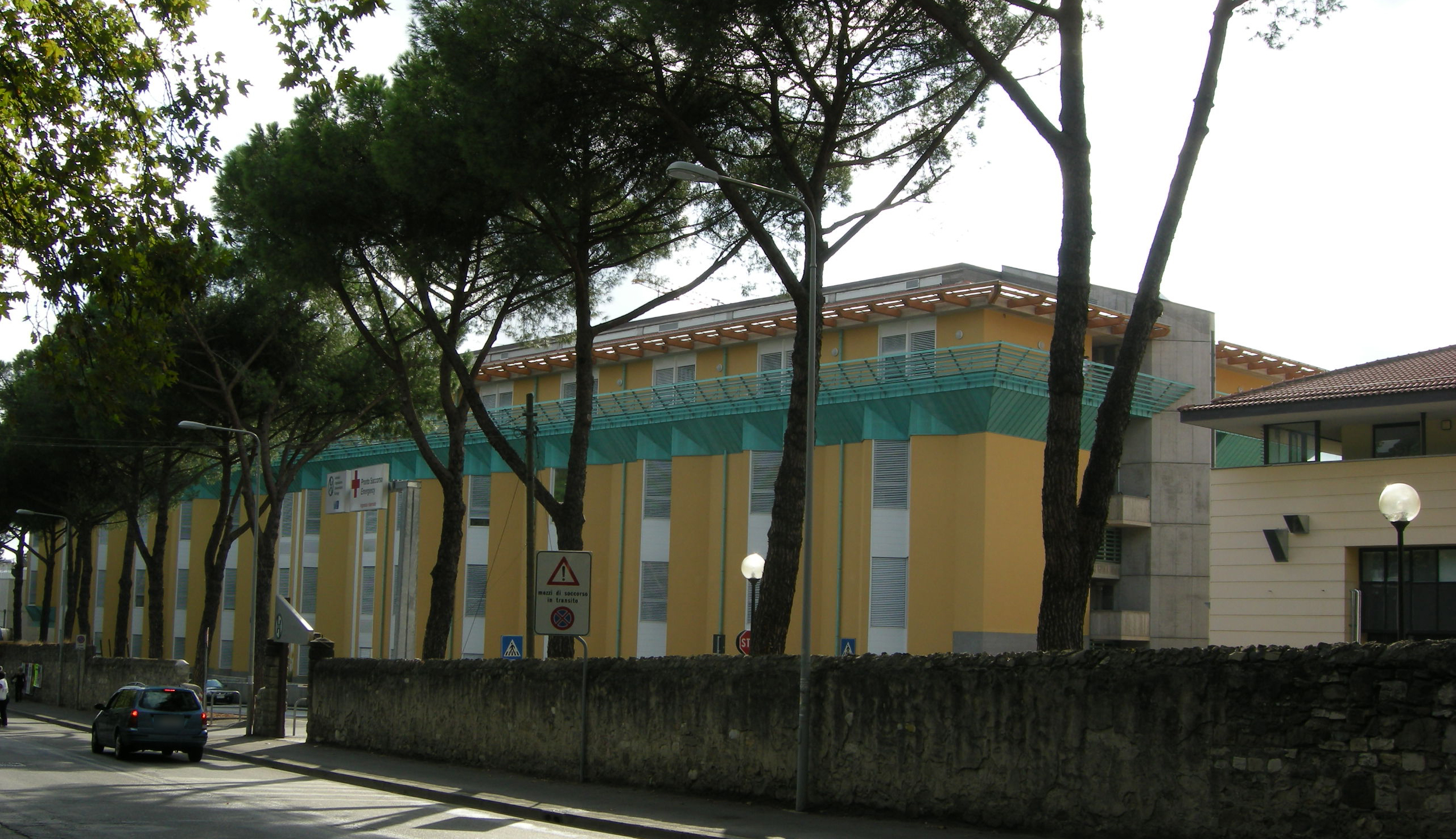 Villa ognissanti, ospedale di careggi